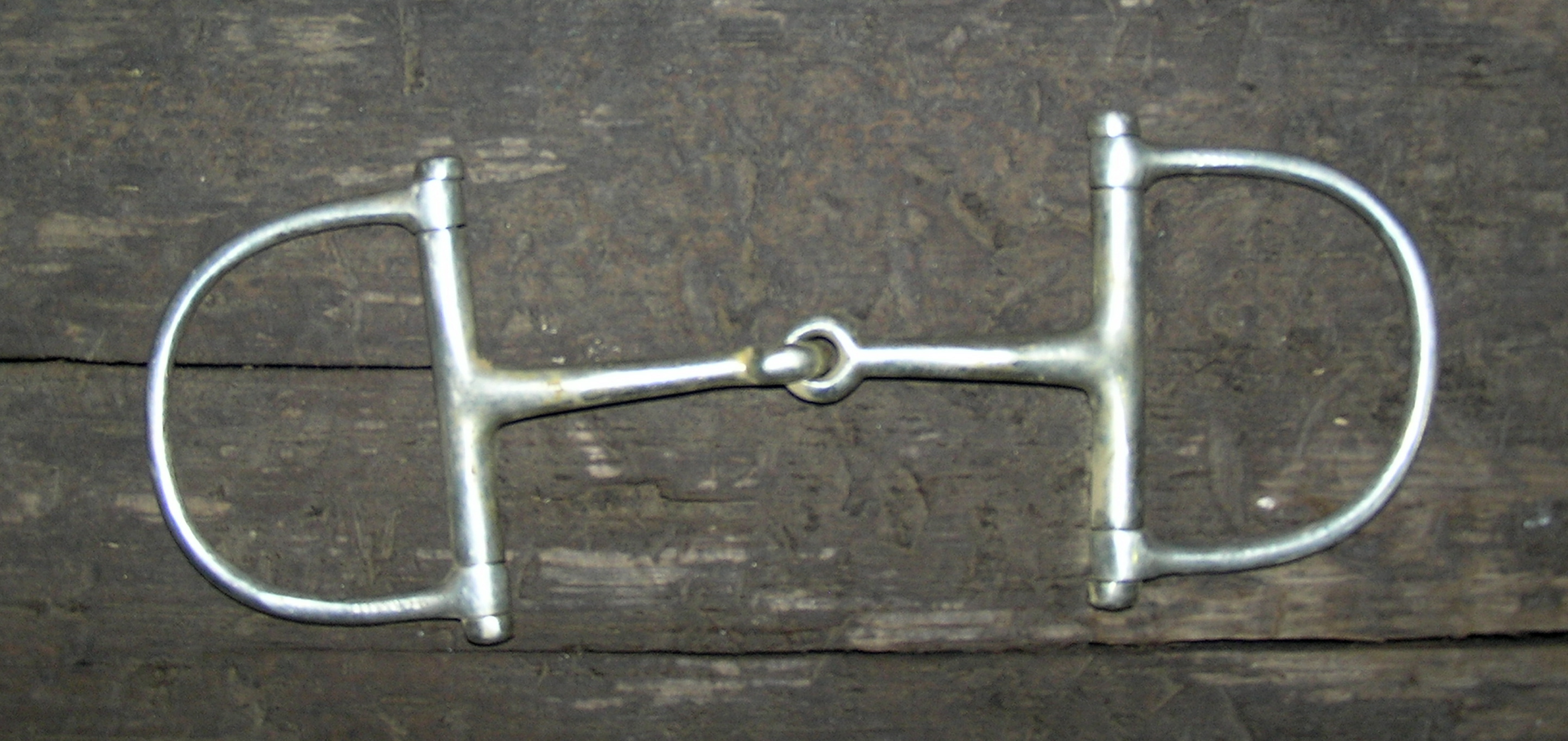 Dee Ring Snaffle Bit